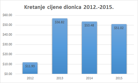 Kretanje cijene dionica